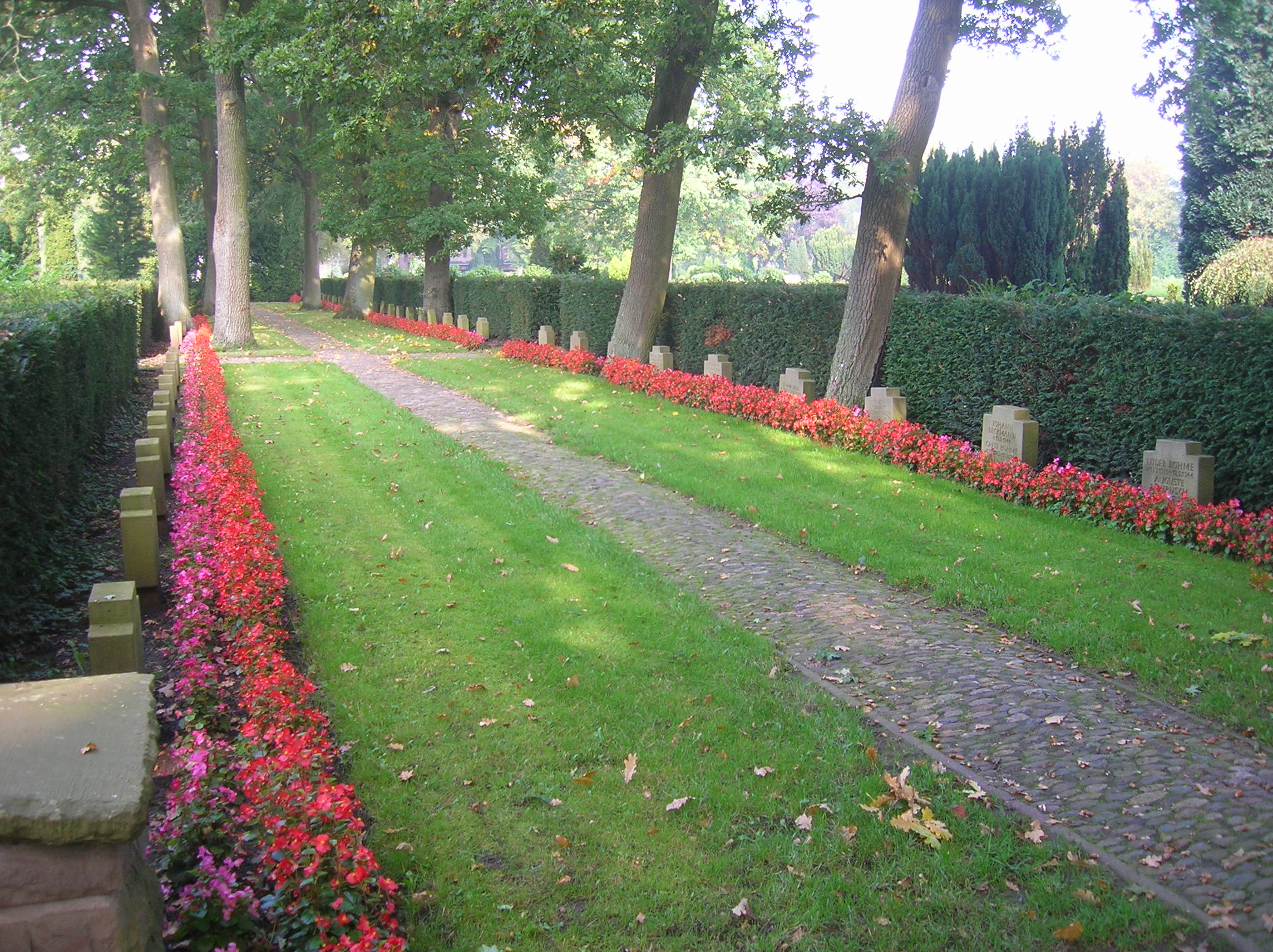 Ehrenhain zur Ehrenhalle für 360 Opfer der Zweiten Weltkriegs auf dem Geestemünder Friedhof.